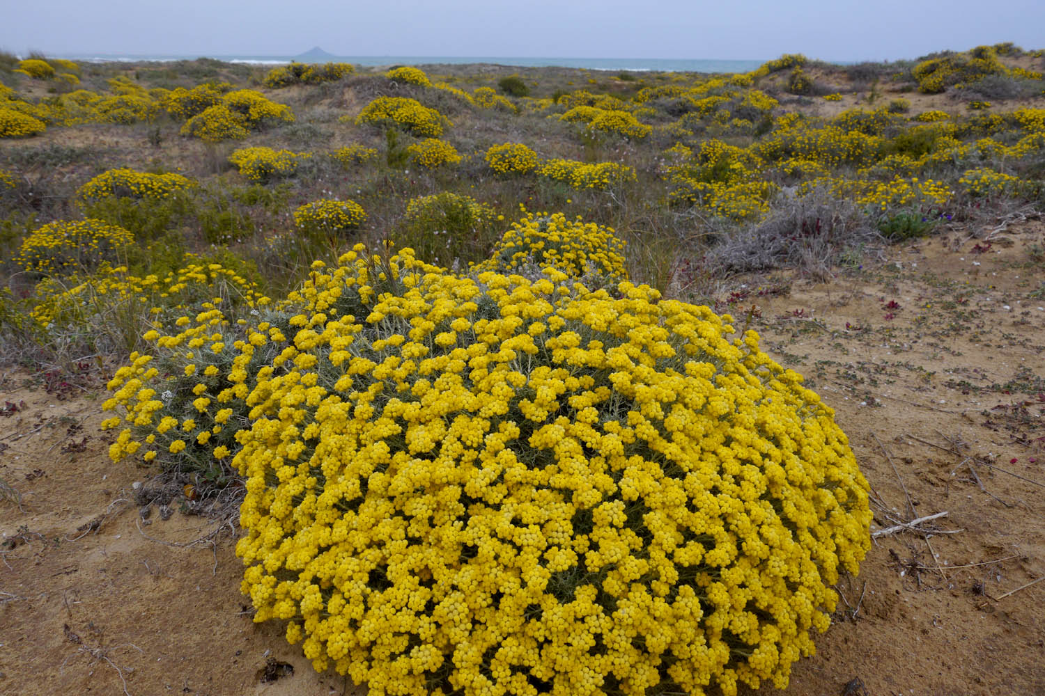 Helichrysum stoechas en las dunas de la playa de las Amoladeras, La Manga del Mar Menor, Cartagena, España.